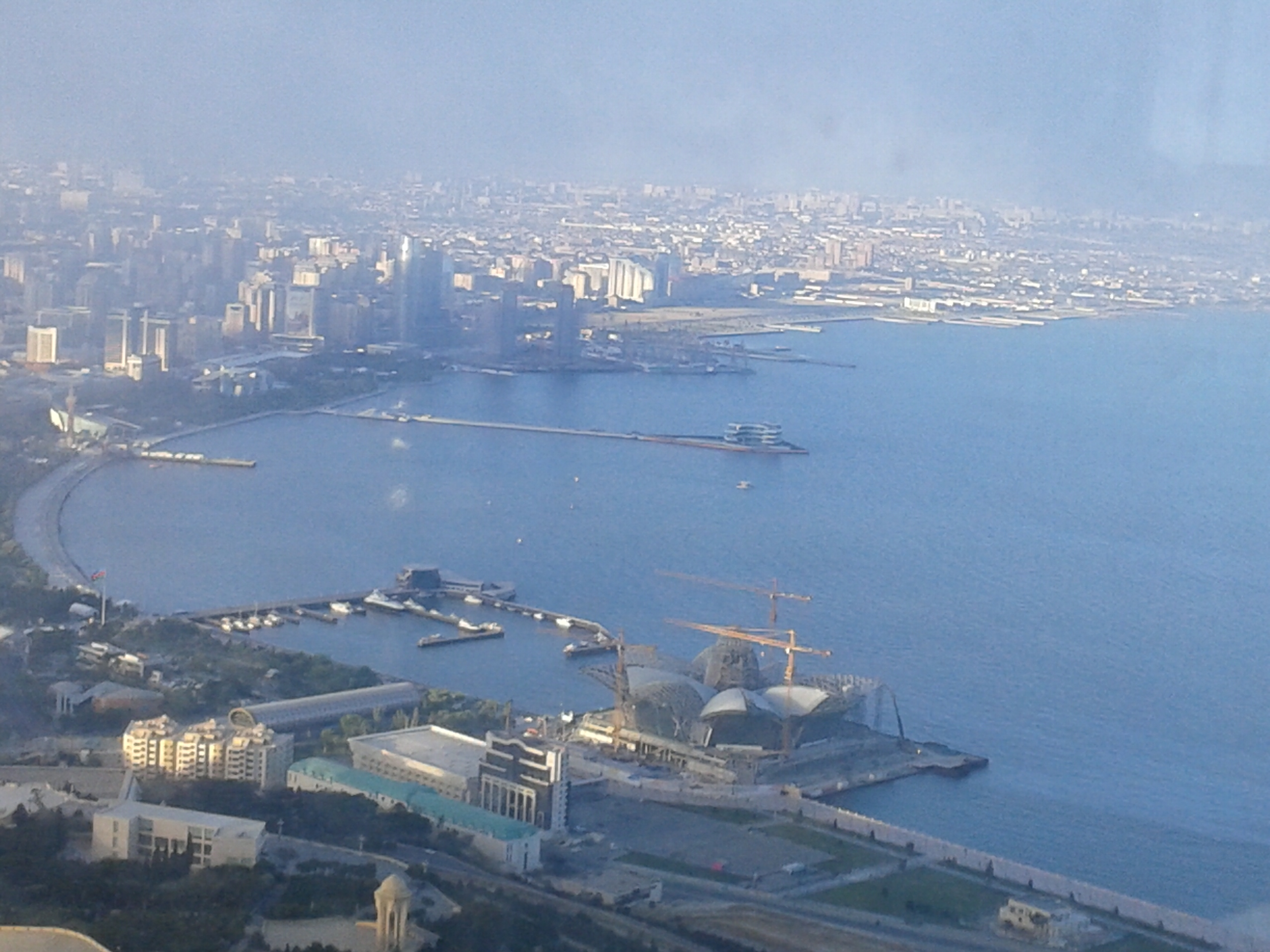 Deniz ada